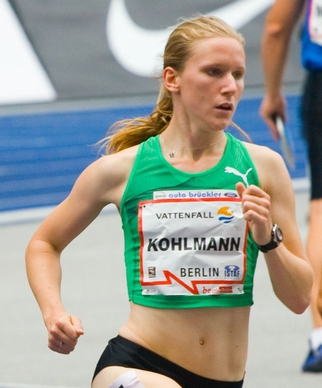 800m Frauen (Christin Wurth-Thomas, Eunice Sum, Fabienne Kohlmann, Elisa Cusma)